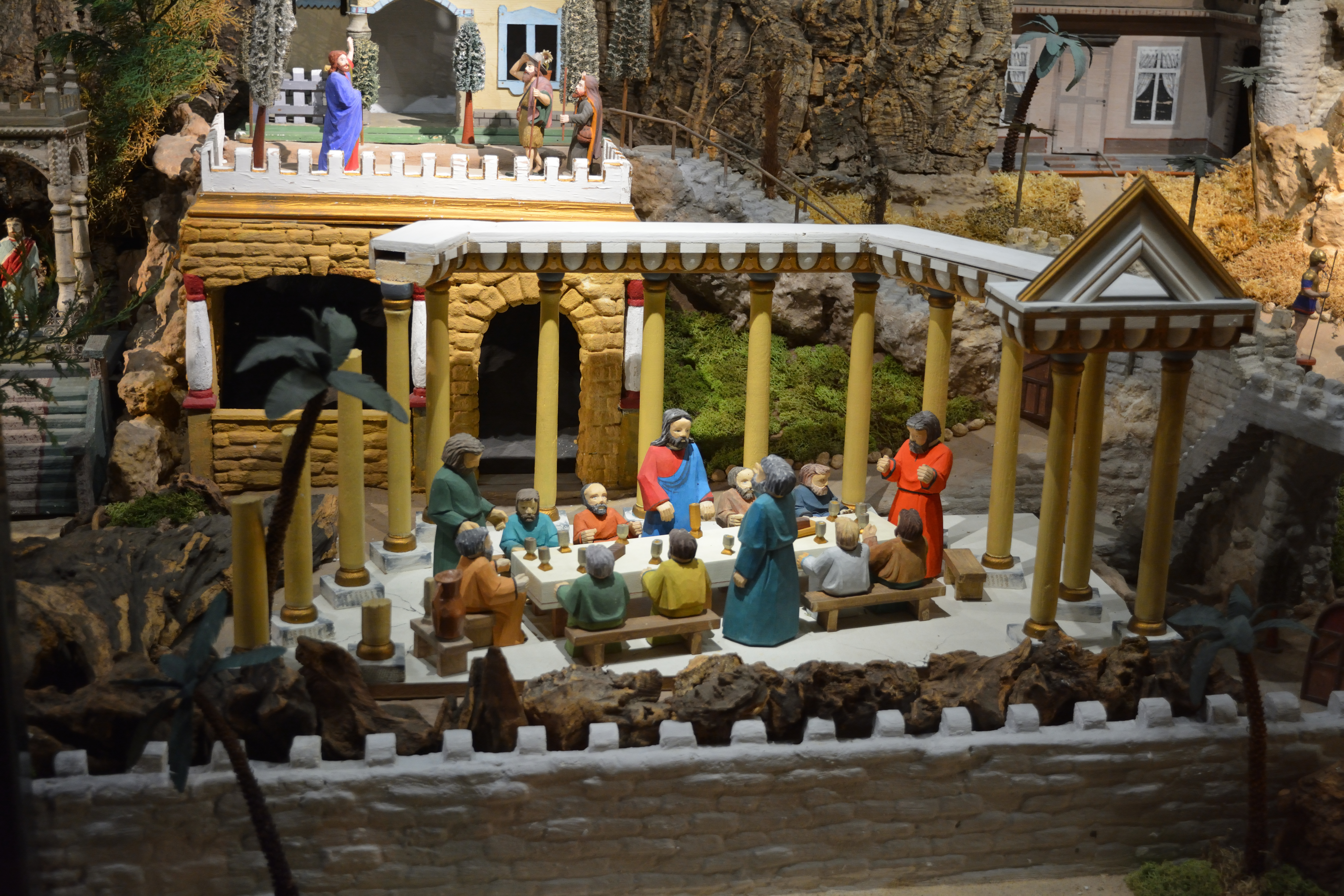 Impressionen aus dem Museum Europäischer Kulturen in Berlin. Ausstellungsraum: Der mechanische Weihnachtsberg aus dem Erzgebirge [1][2]